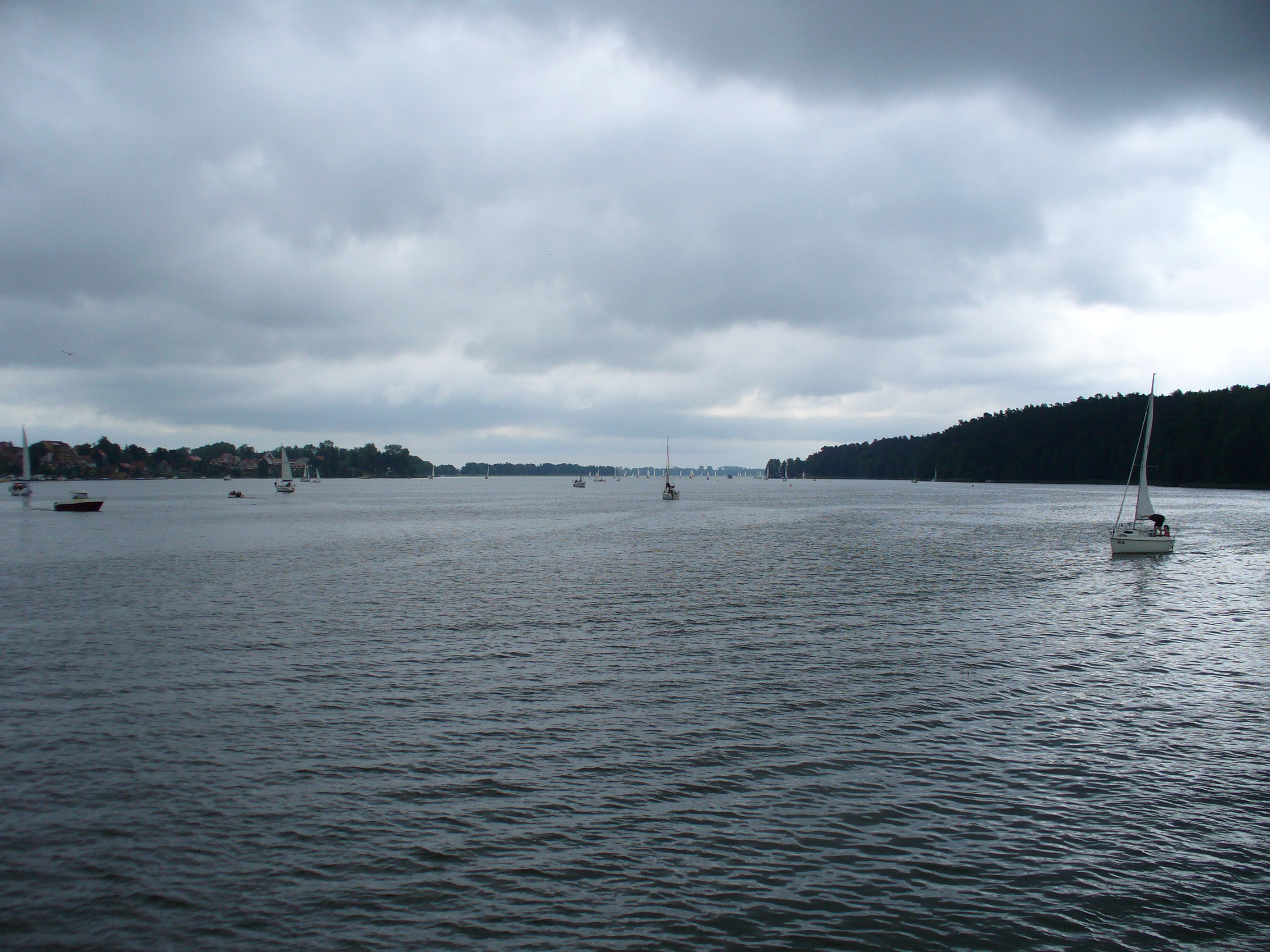 Śniadrwy